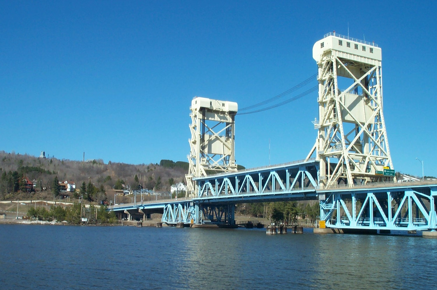 Portage Lake Lift Bridge, Michigan, USA